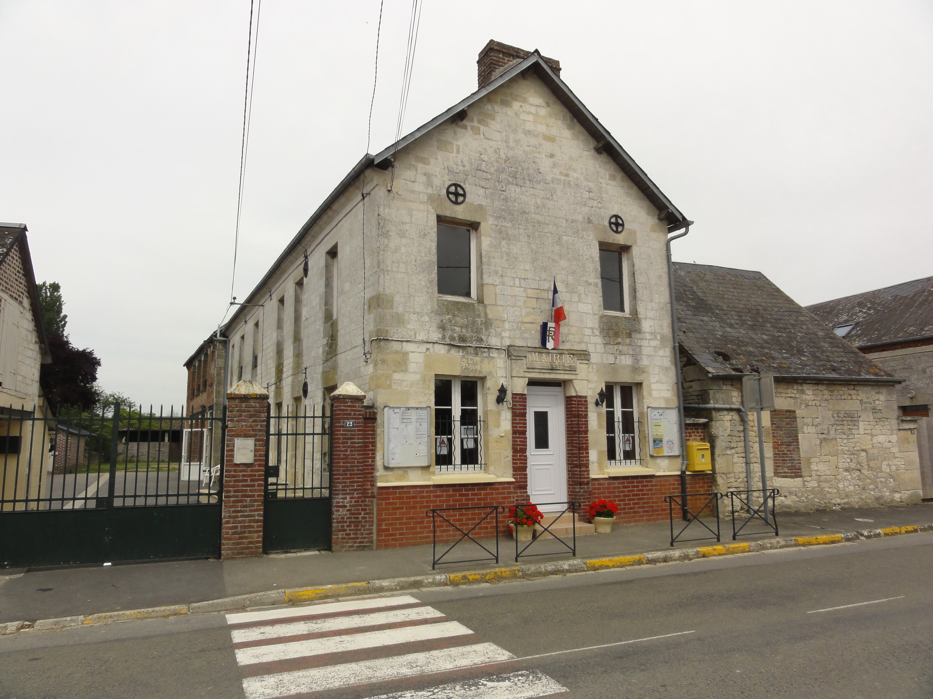 Le Thuel (Aisne) mairie